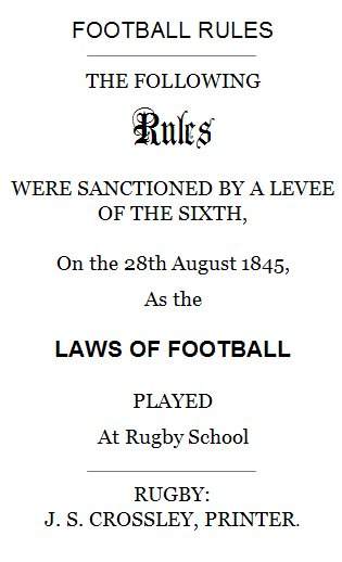 Copia de la portada de la publicación original del Código Rugby de las leyes del football, en 1845